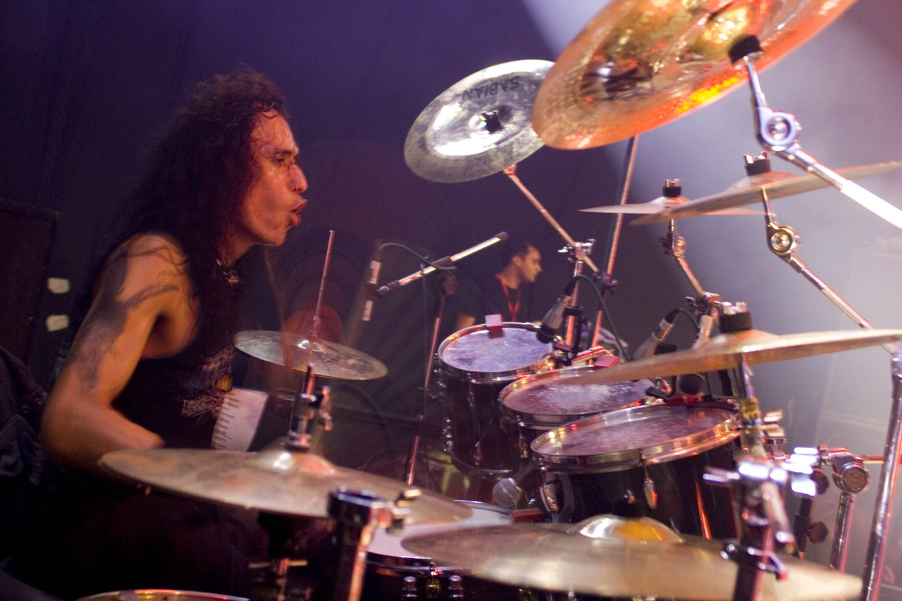 Pete Sandoval of Morbid Angel Live @ Santana Hall - 08/03/2009 - São Paulo, Brasil É proibida a cópia ou reprodução deste material sem a autorização do autor. Por favor, não publique nada daqui sem o devido crédito. Fotógrafo: Alexandre Cardoso